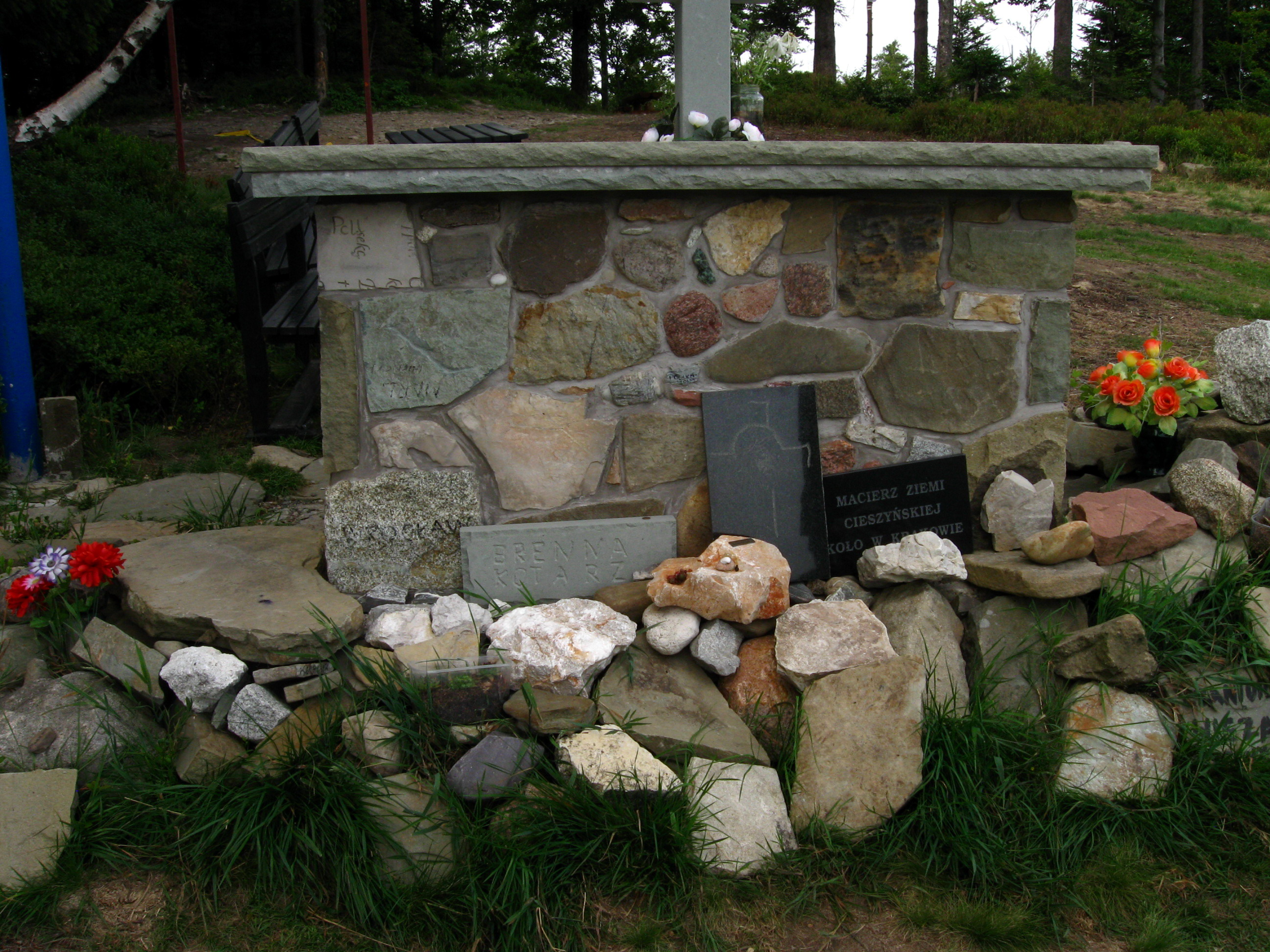 Kamienny ołtarz na górze Kotarz